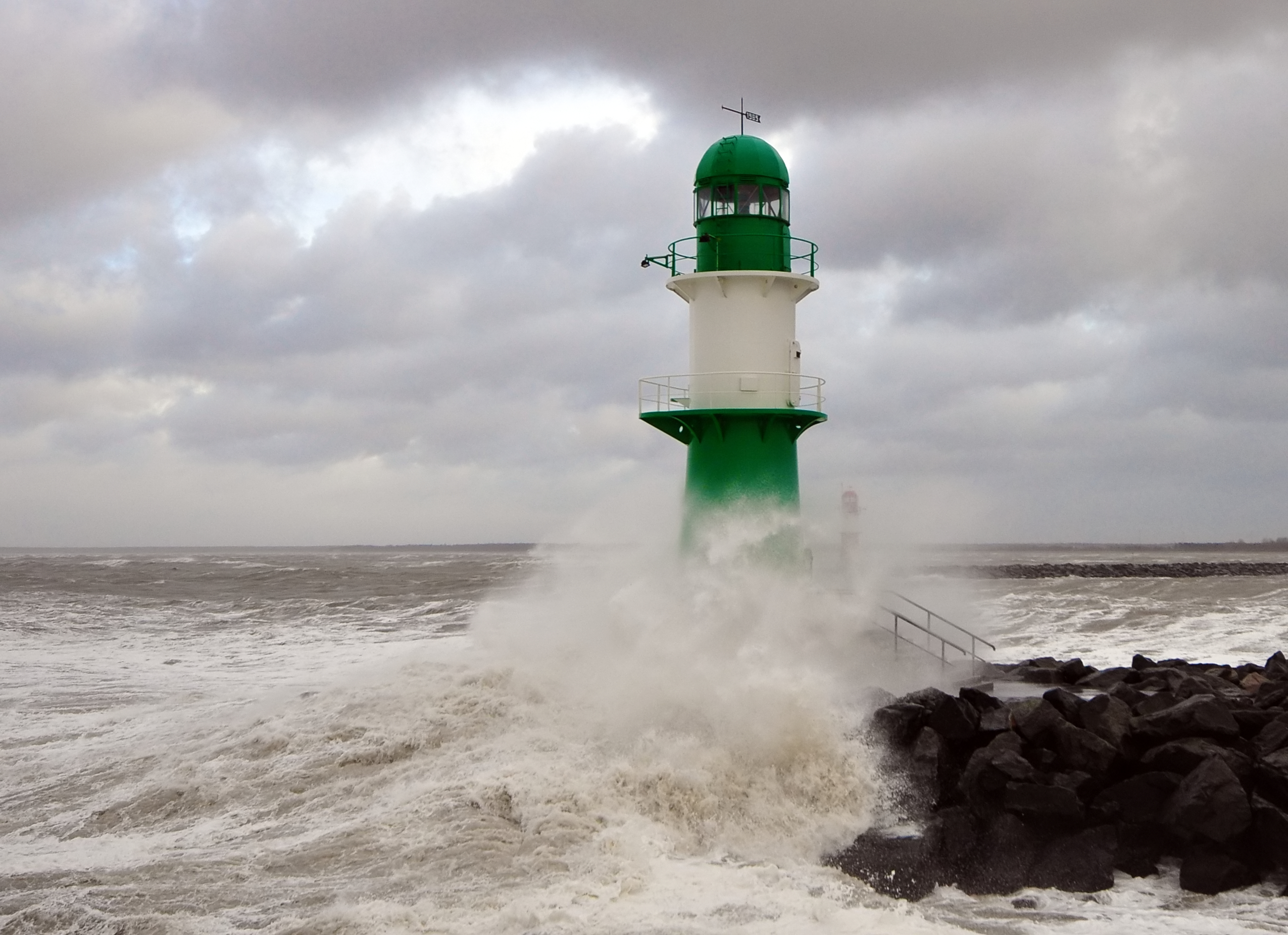 storm Xaver in Warnemünde, 2013